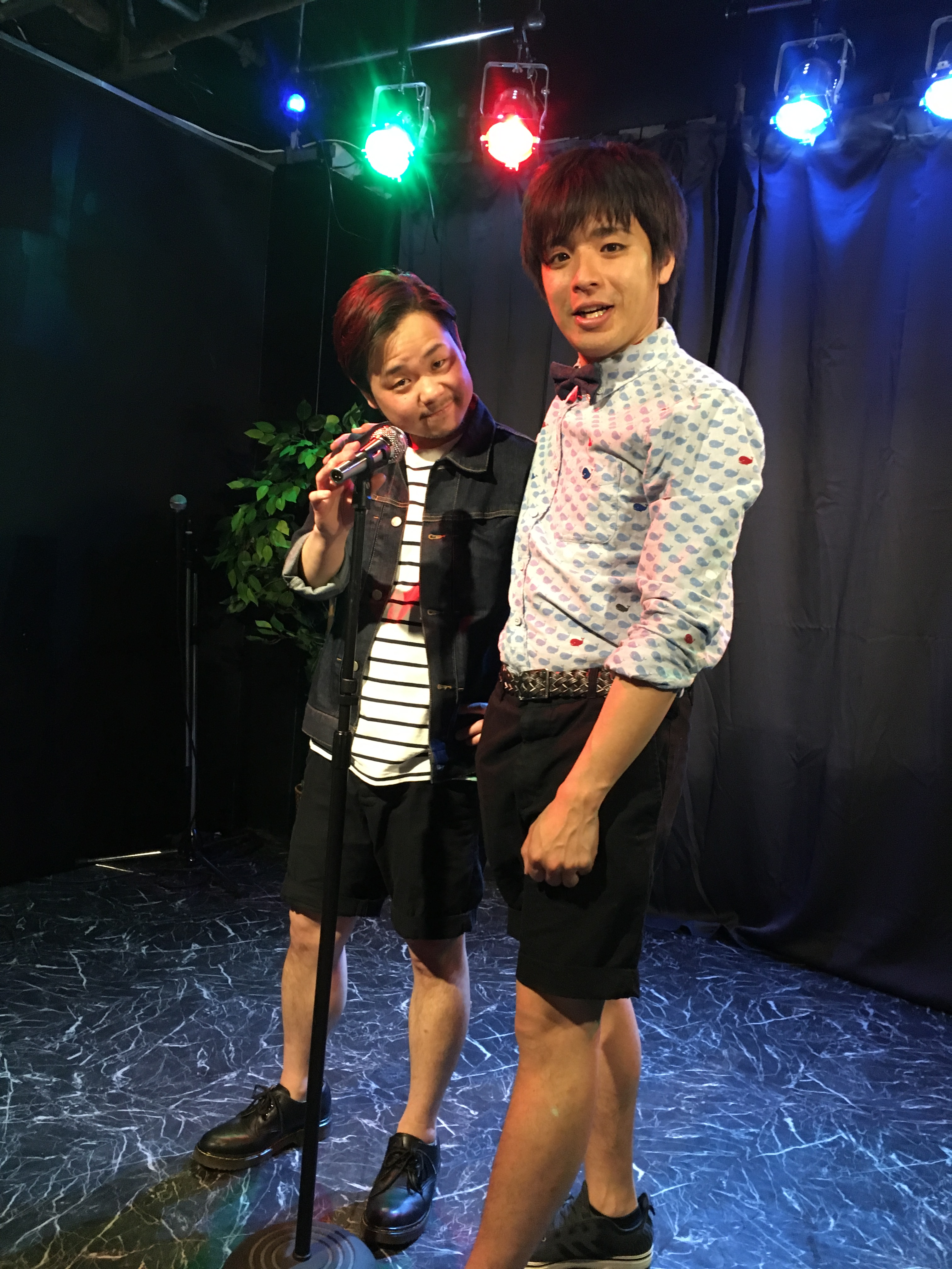 前田かずのしん（左） 石本しょーき（右） 2019年4月20日新宿オルティナスタジオにて撮影